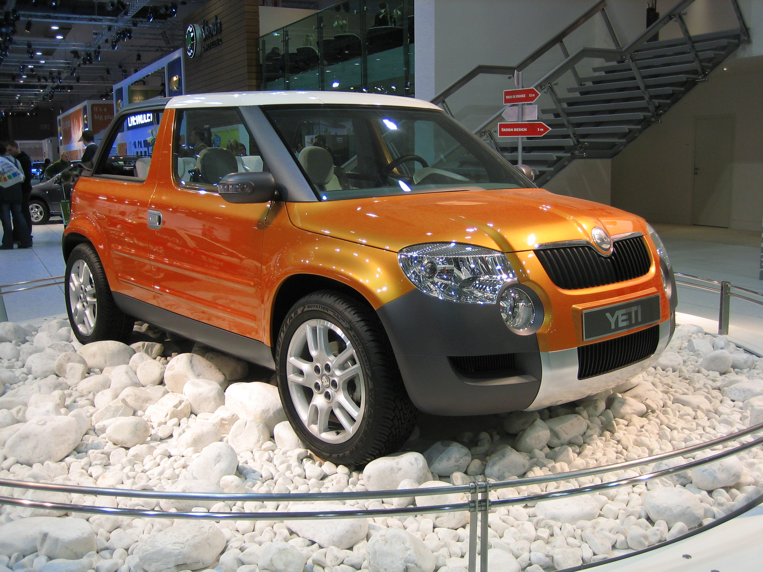 Skoda Yeti (Brussel 2006). Eigen werk, PD.